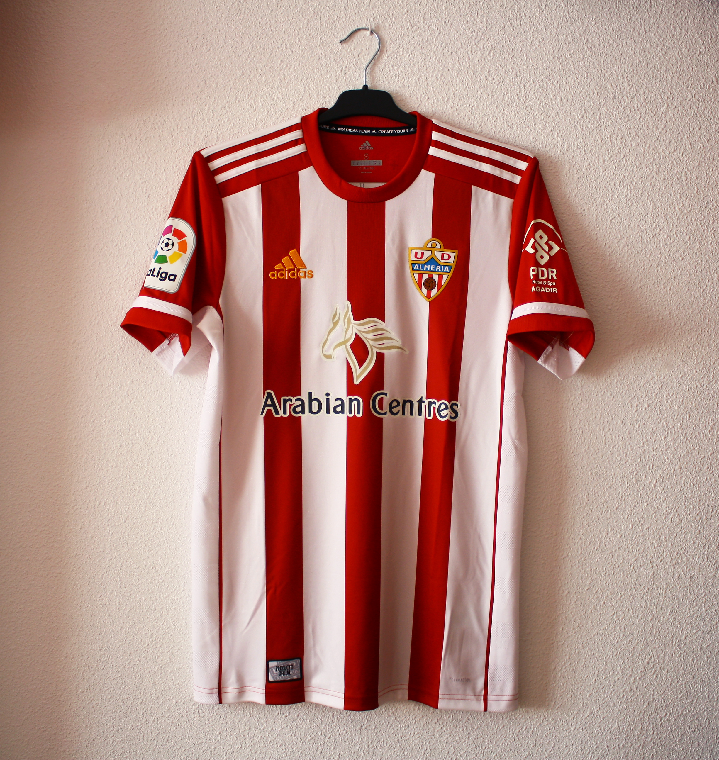 Camiseta U.D. Almería 2019-2020